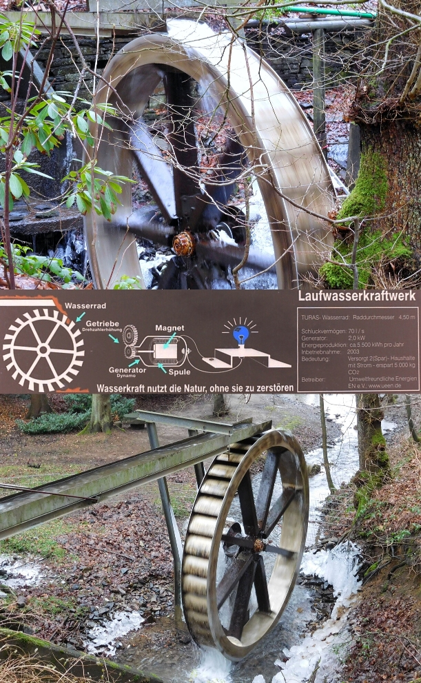 Mini-Laufwasserkraftwerk im Hülsenbecker Tal in Ennepetal: Wasserrad und „Dynamo“ = umweltfreundliche Energiegewinnung.